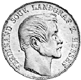 Ferdinand van Hessen-Homburg